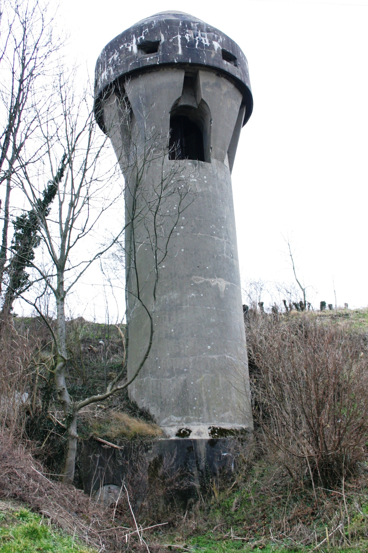 Entlëftungstuerm vum Fort d'Évegnée-Tignée.